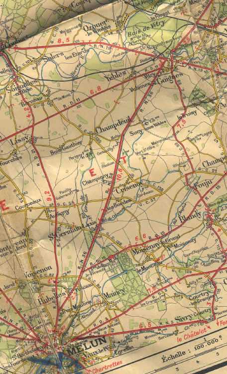 carte du tram de Verneuil-l'Étang à Melun, Seine-et-Marne, France.